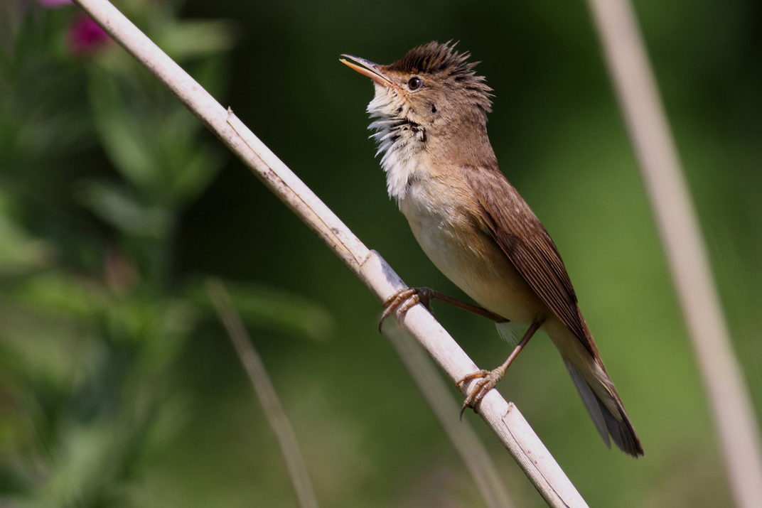 De Acrocephalus arundinaceus is een zangvogel uit de familie van Acrocephalidae.